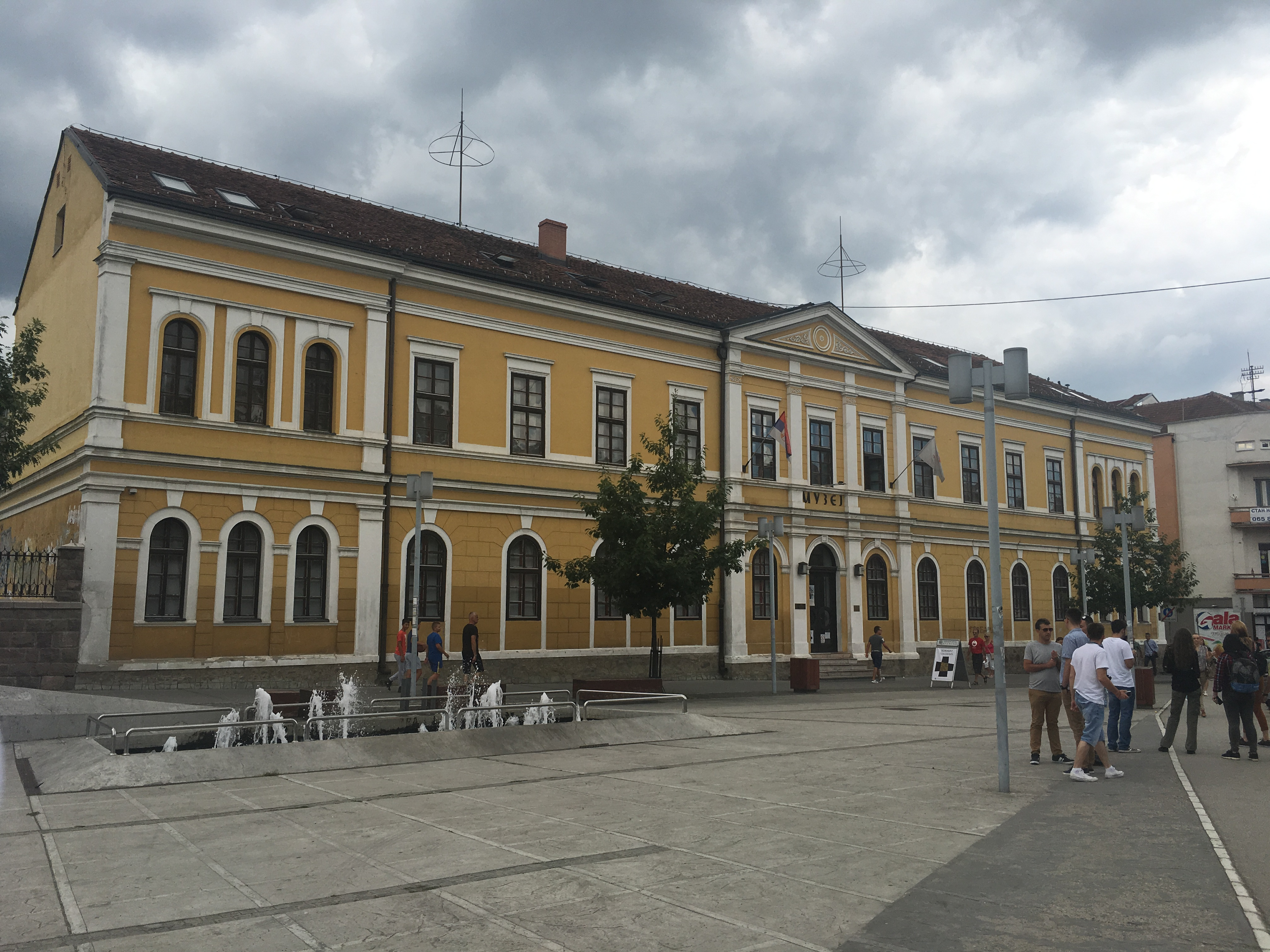 Muzej u Kraljevu, foto-tura na Edu Viki kampu 2017.